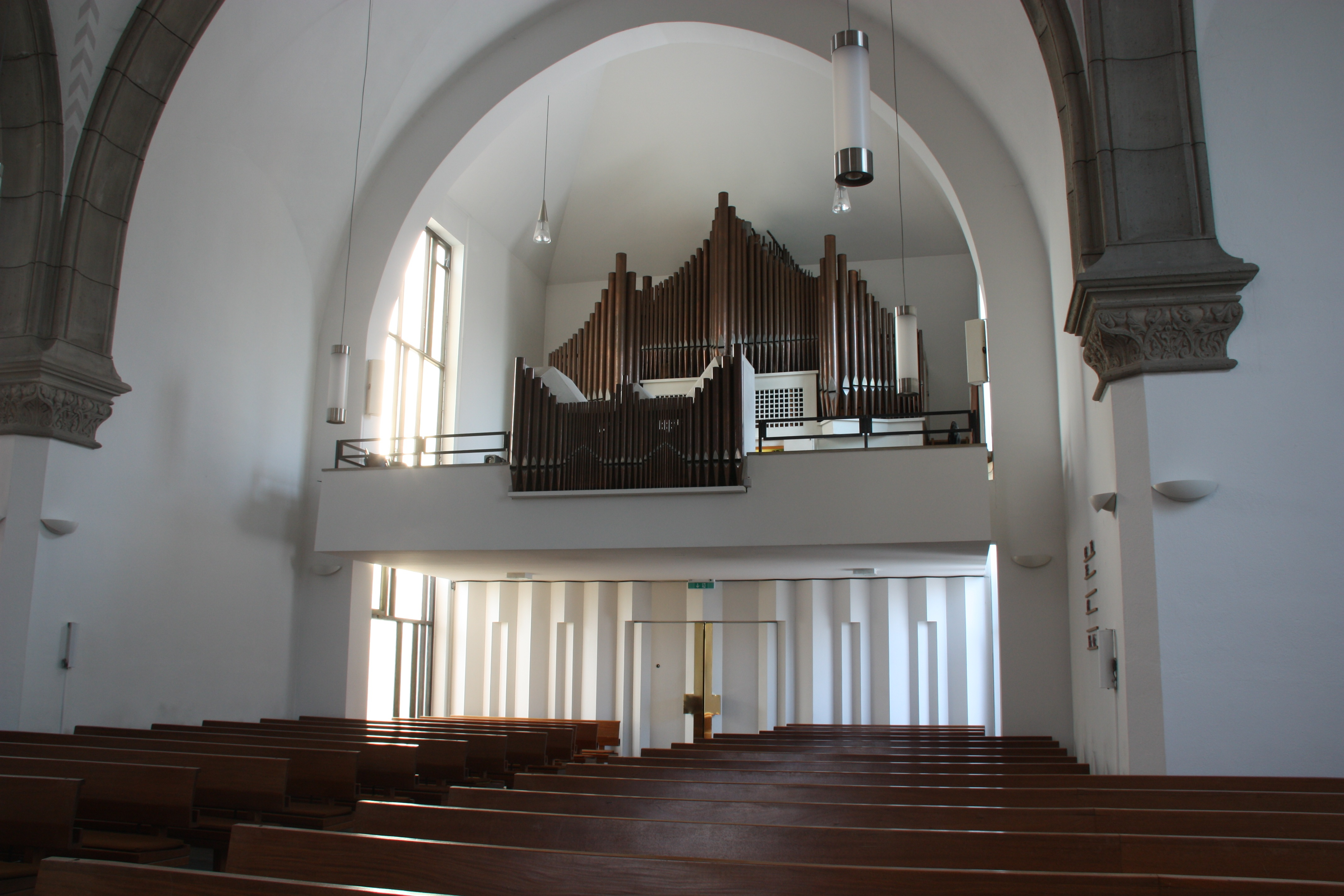 Hamburg, Christuskirche Othmarschen, Innenraum, Orgel, Entwurf durch Rudolf von Beckerath 1936